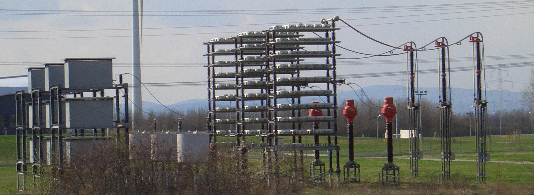 Umspannwerk Wien-Südost, Anlagenteile der ehemaligen GKK Wien-Südost